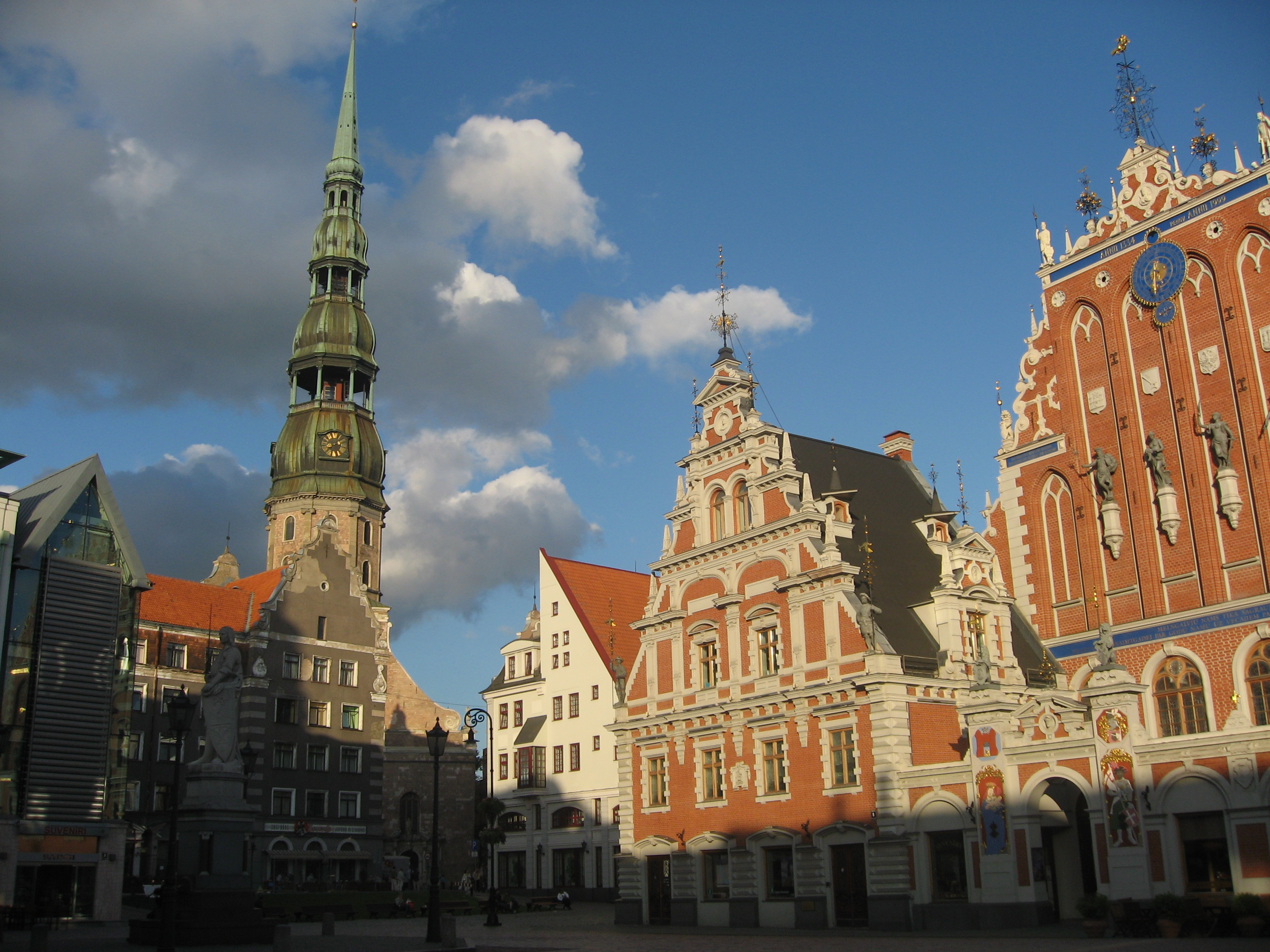 Dům černohlavců (vpravo)